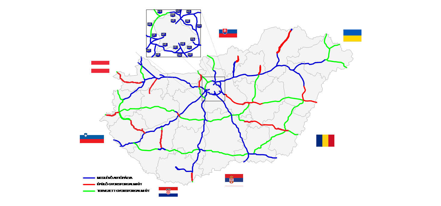 2018 egész évére érvényes térkép.